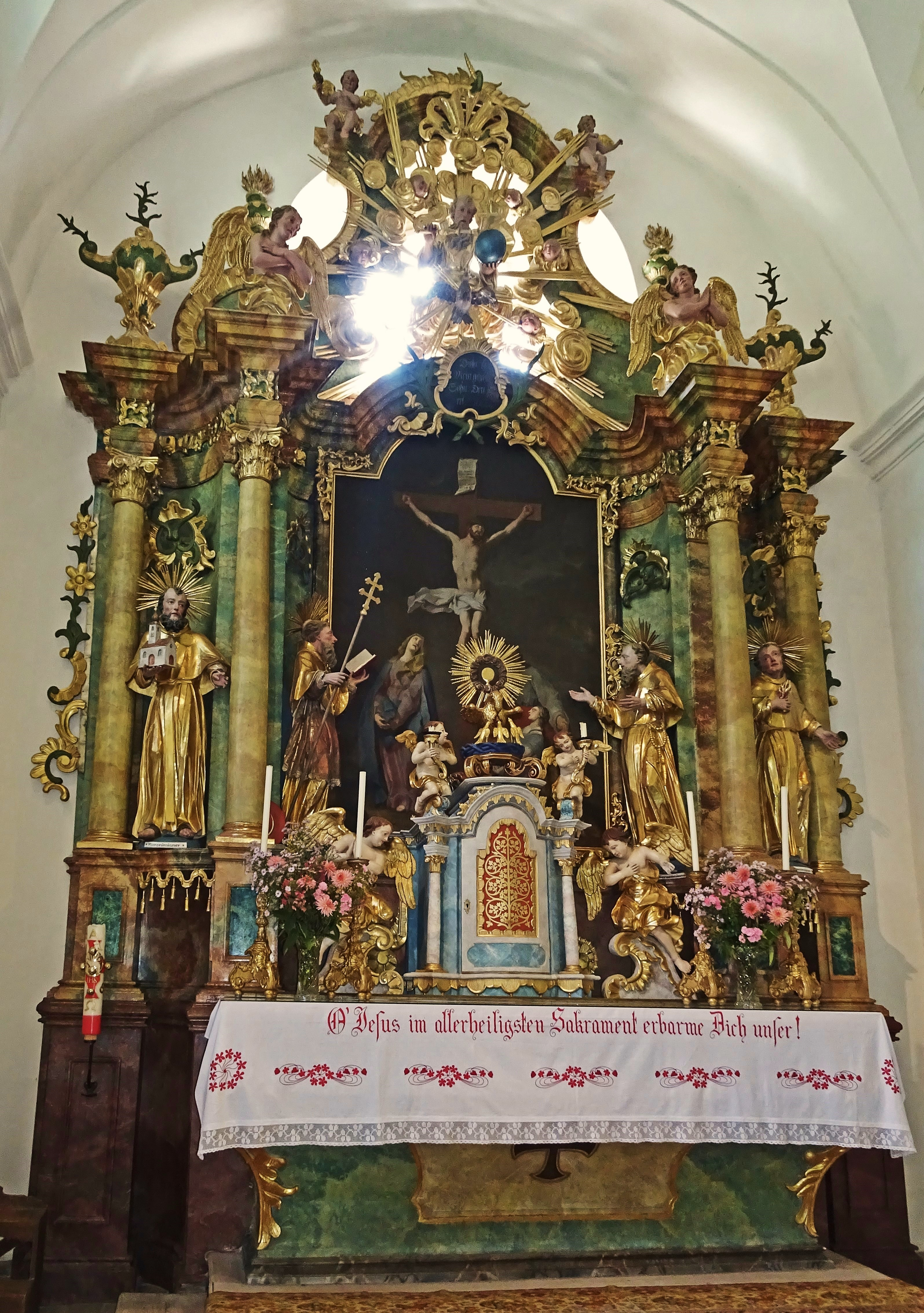 Klösterle, Innerteuchen (Arriach), Hochaltar der Pfarrkirche Hl. Kreuz